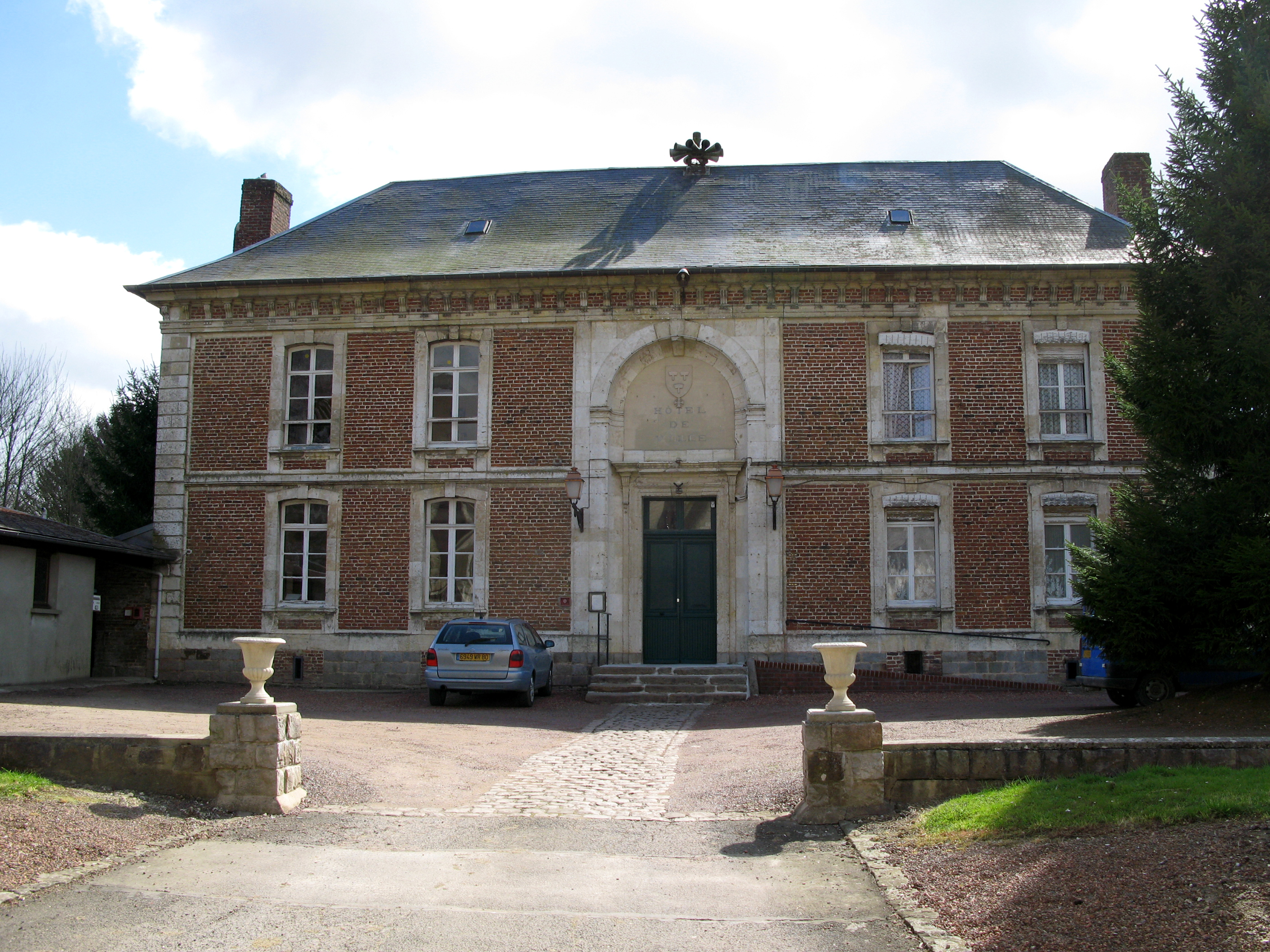 Mailly-Maillet (Somme, France) - L'hôtel-de-ville.